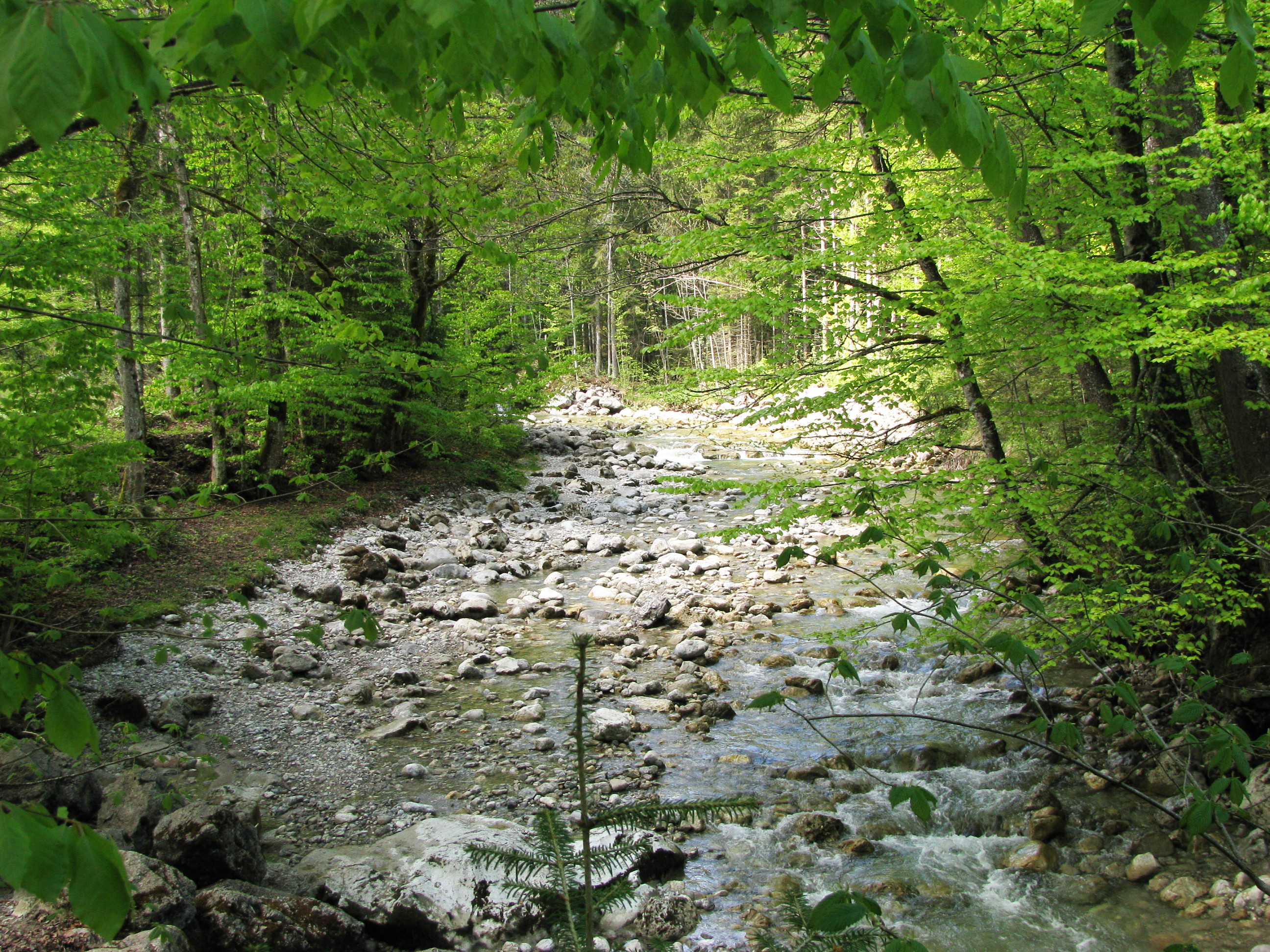 Der Auerbach oberhalb des Tatzelwurm-Wasserfalls.